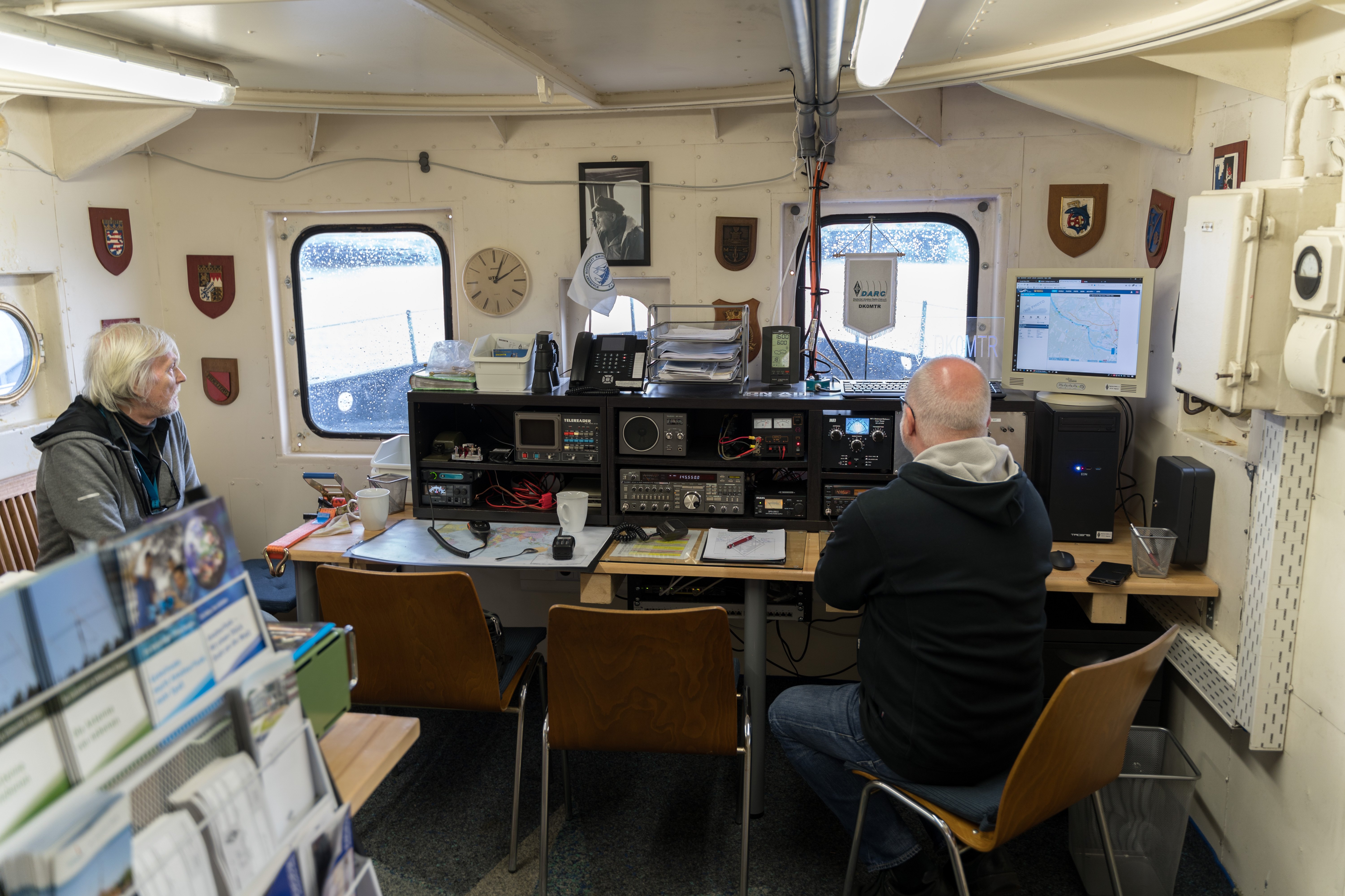 Zu sehen sind zwei Funkamateure in der Amateurfunk Clubstation DK0MTR. Diese befindet sich in der ehemaligen Bord-Werkstatt des Schleppers Regina.